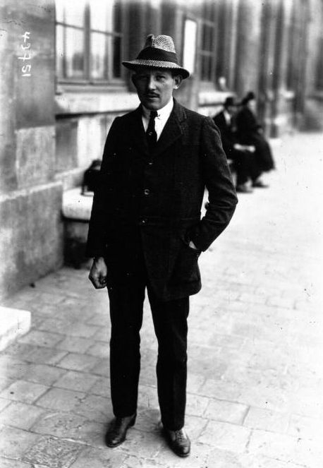 A Reims, coupe G.B. : Prevost en pied